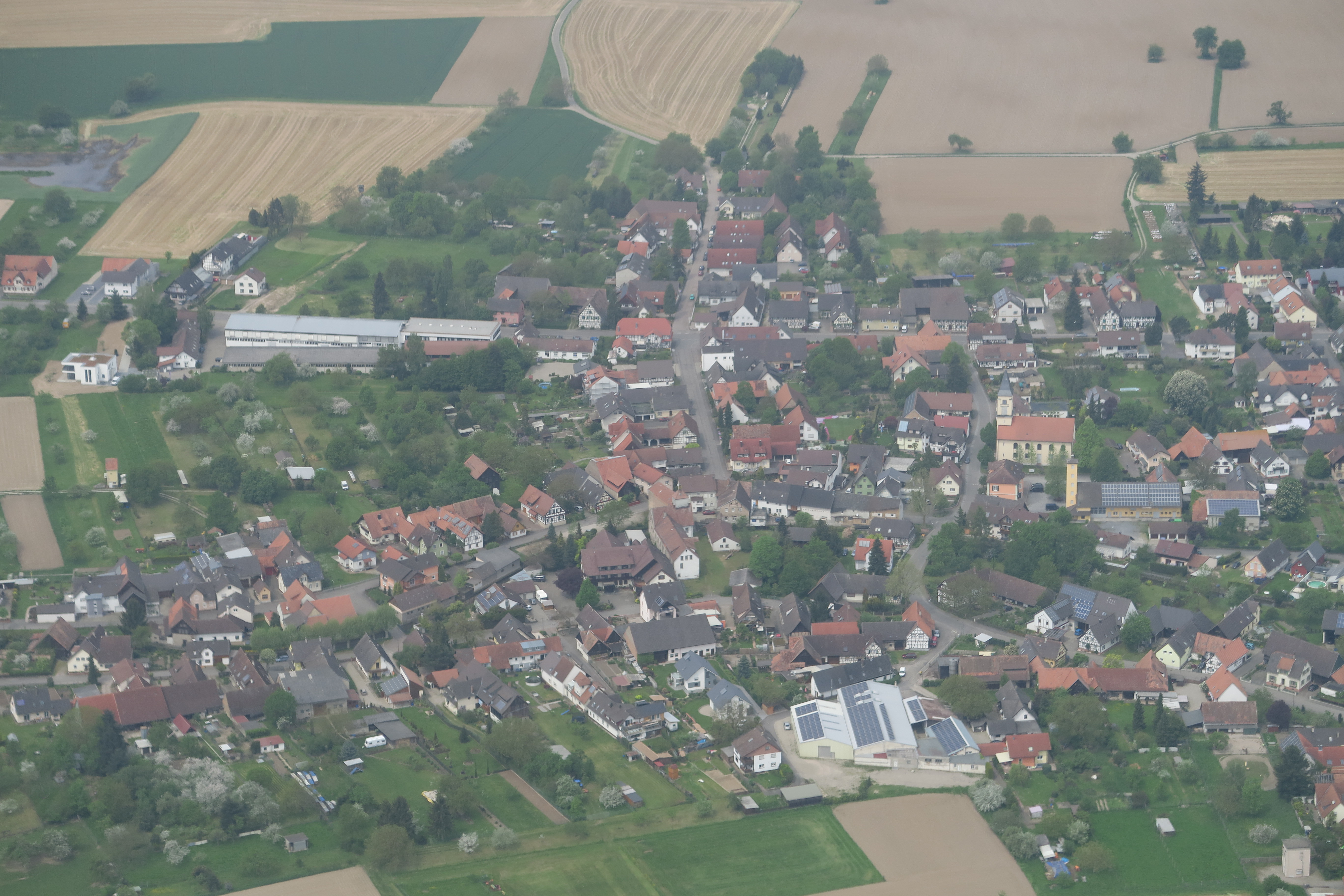 Lichtenau-Scherzheim aus der Luft